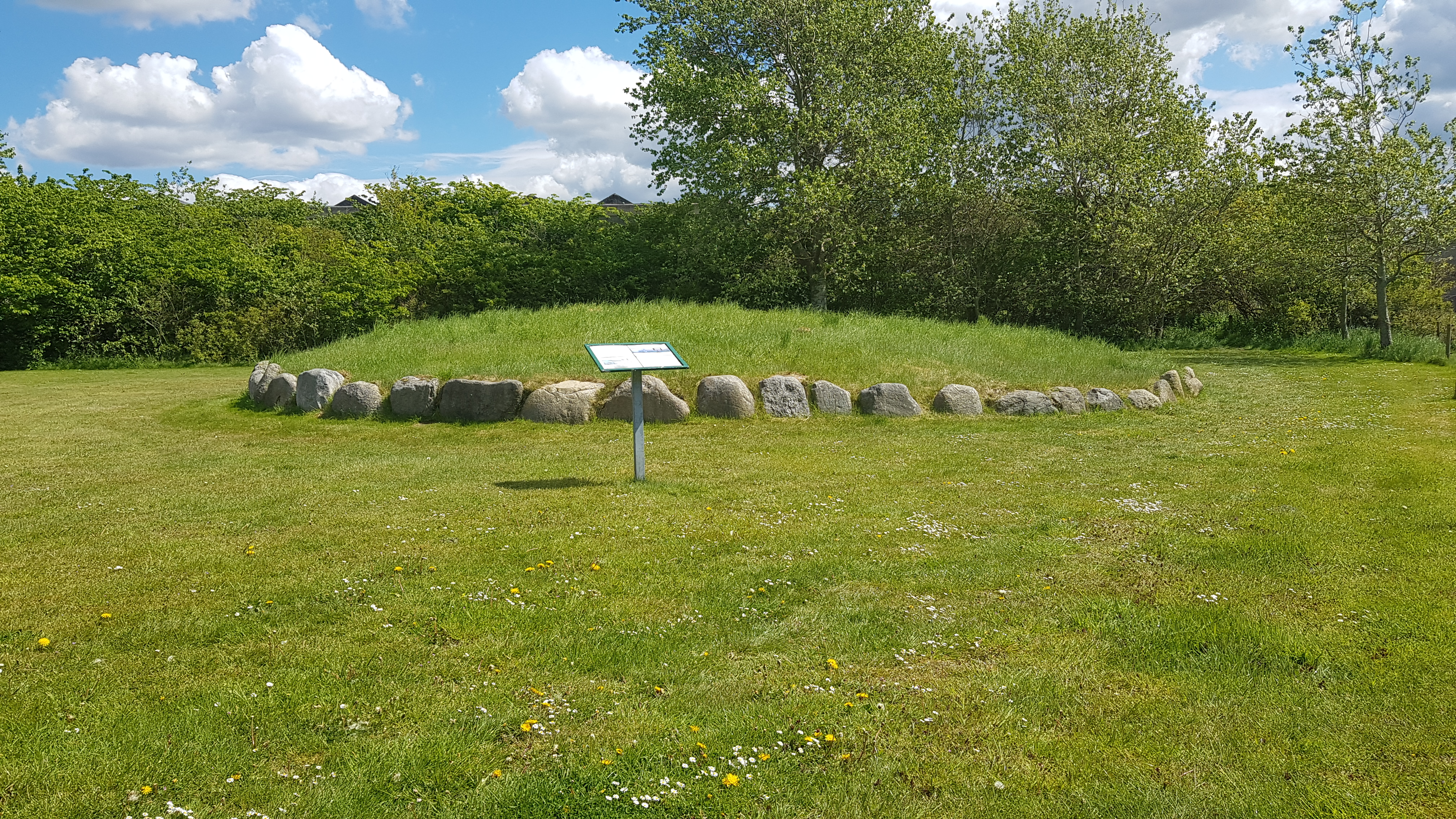 Jættestuen fra Gammelenge